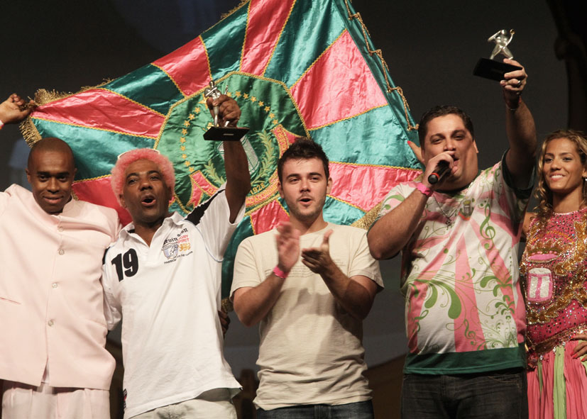 Fotógrafo Henrique Matos